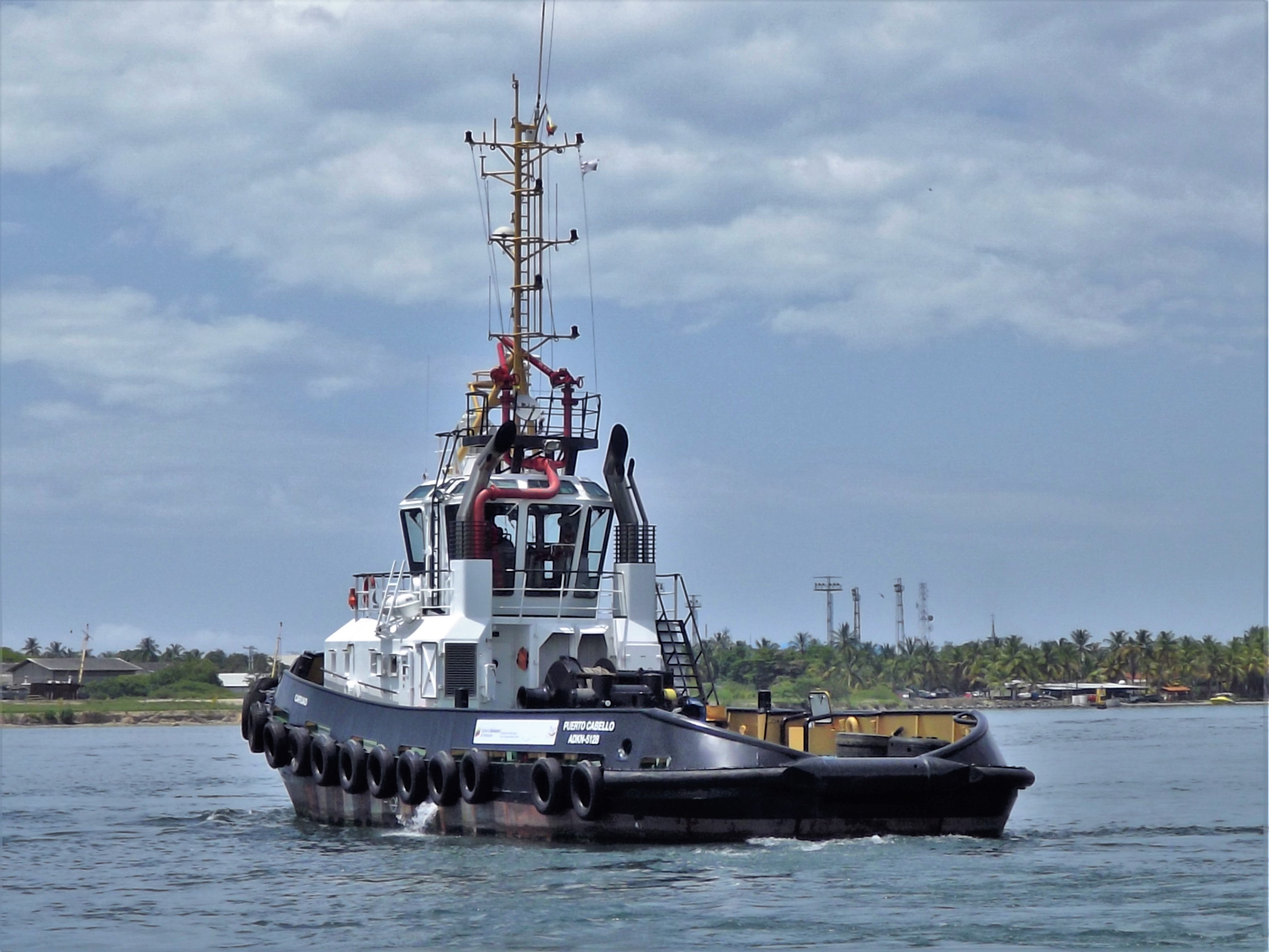 Remolcador Carruao maniobrando en Puerto Cabello, Venezuela